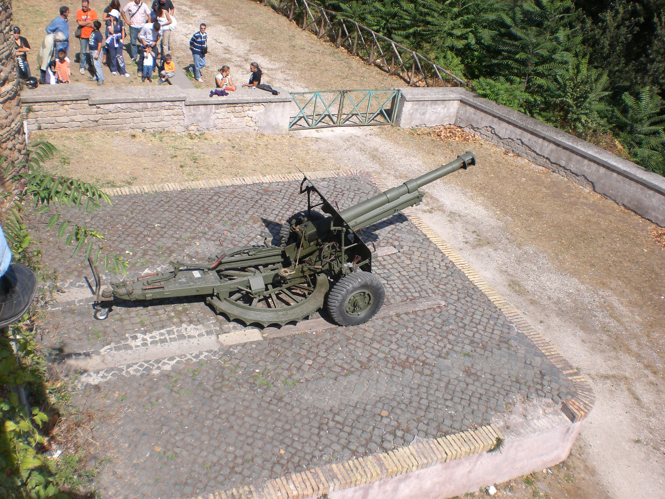 Sono l'autore della foto